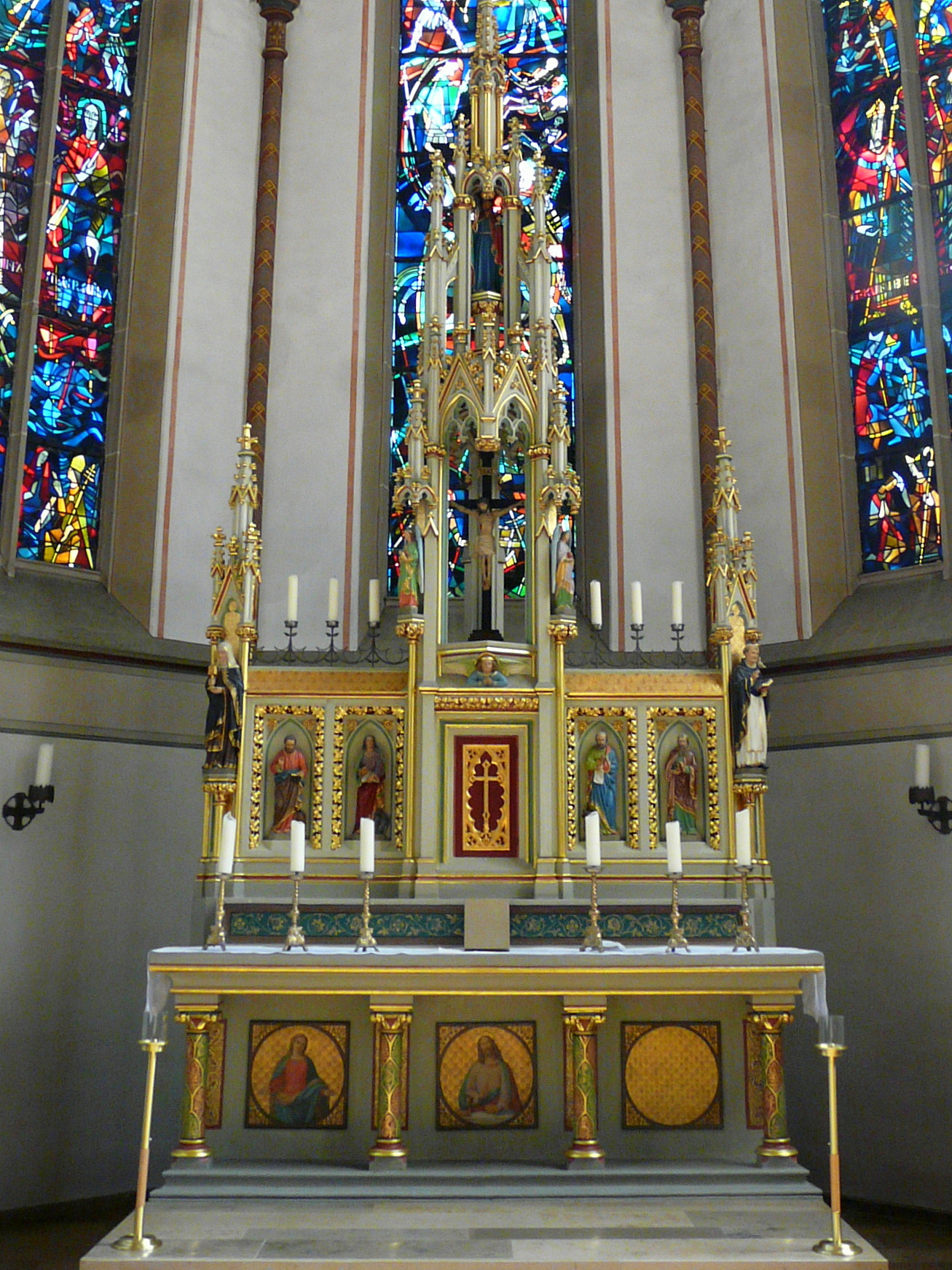 Neugotischer Hochaltar aus Tuffstein nach Plänen von Fr.von Schmidt